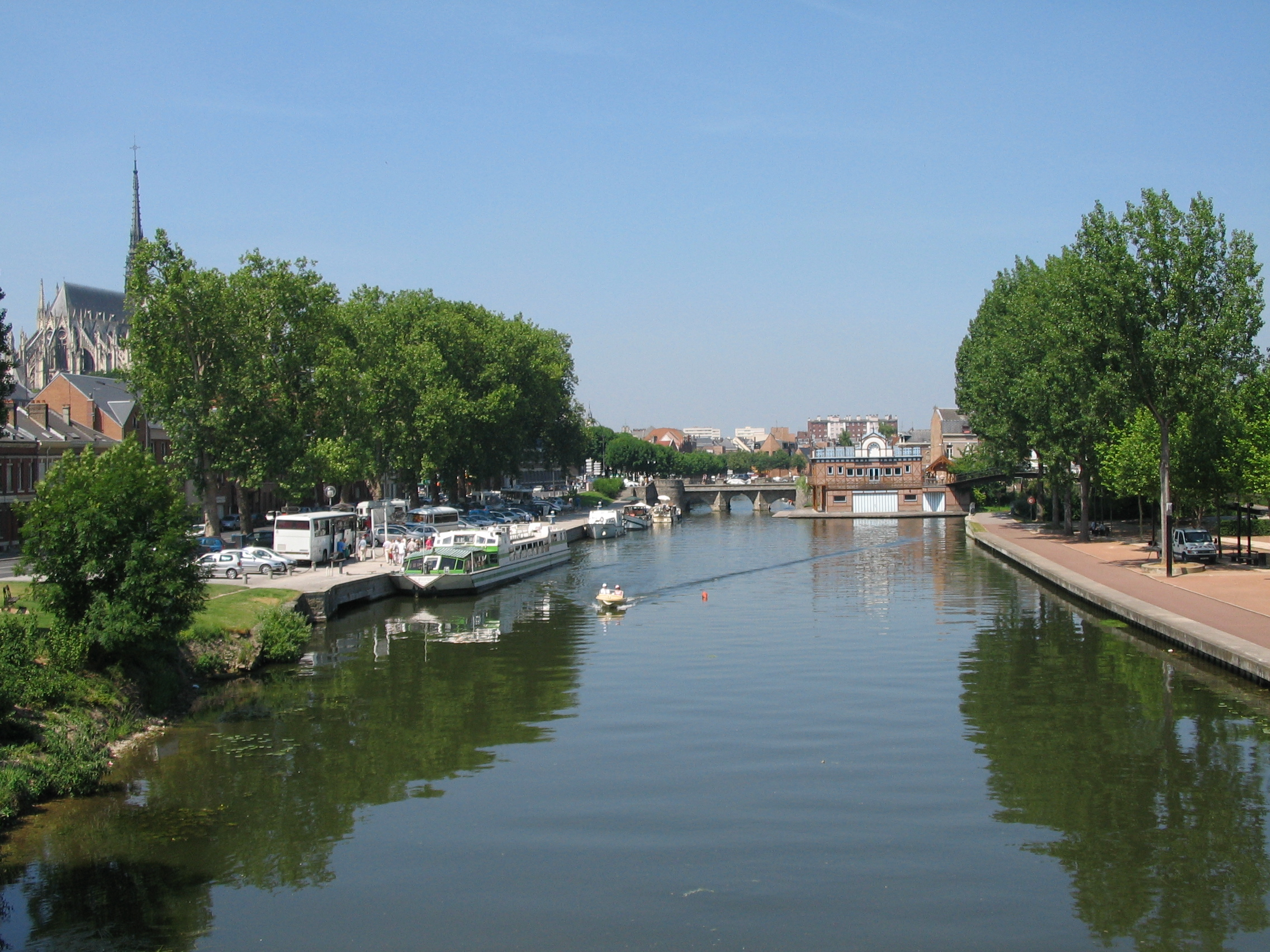 La Somme.